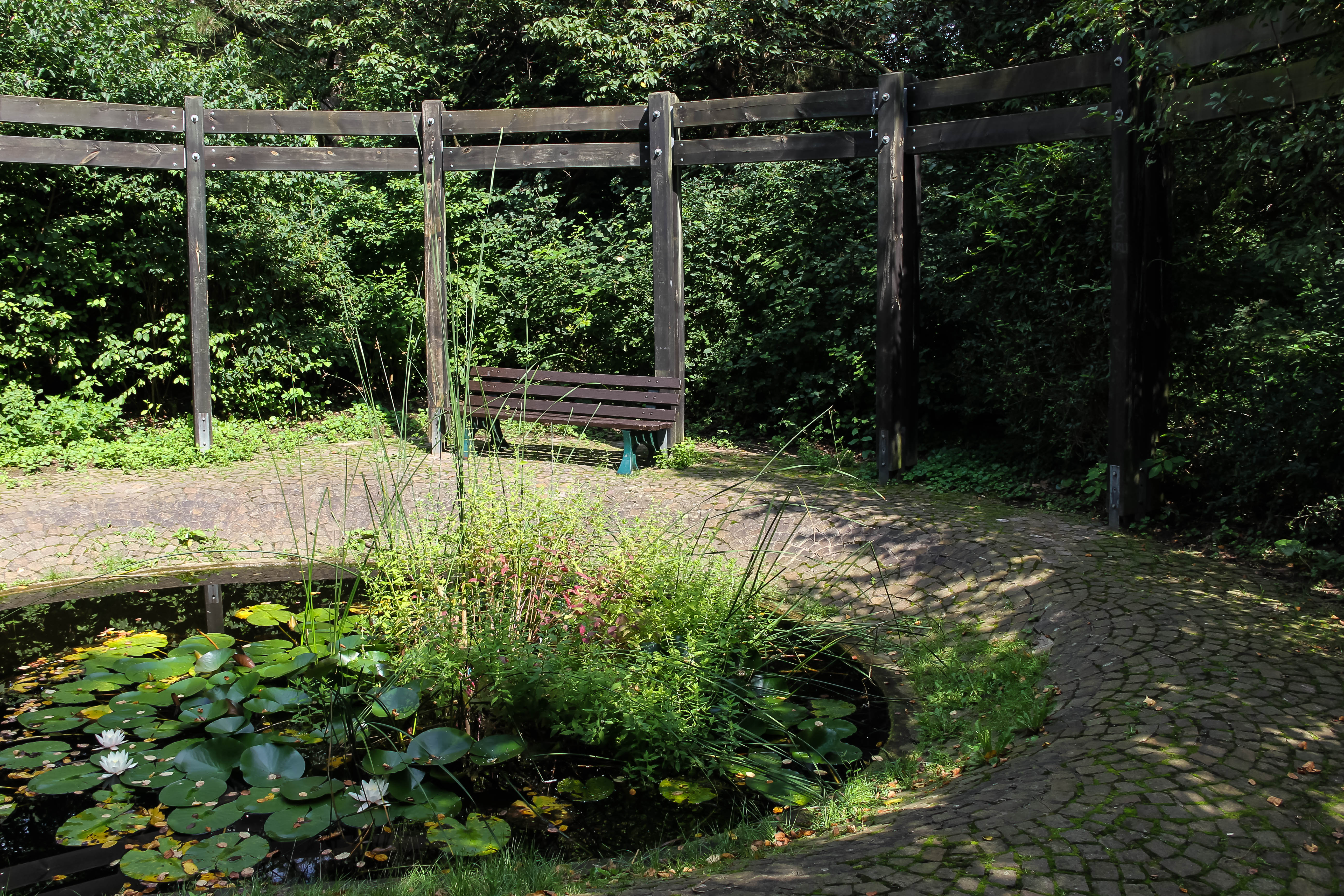 Deutscher Garten; Der 3.500 qm große Garten wurde 1979 anlässlich der Bundesgartenschau in der Bonner Rheinaue (linksrheinisch) angelegt. Es gab es u. a. einen Lehrschaupavillon, den sogenannten Gärtnerpavillon, und vier kreisrunde, 10 Meter im Durchmesser, Gartenräume. Der Garten, ohne Pavillon, ist heute noch vorhanden.